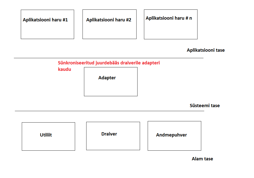 Mitmeastmeline seadmedraiver